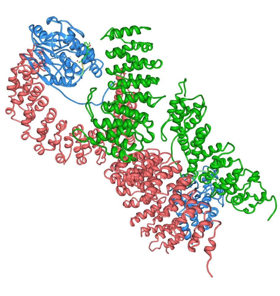 Estructura 3D de la holoenzima proteína fosfatasa 2A. Realizada con ProteinWorkshop.